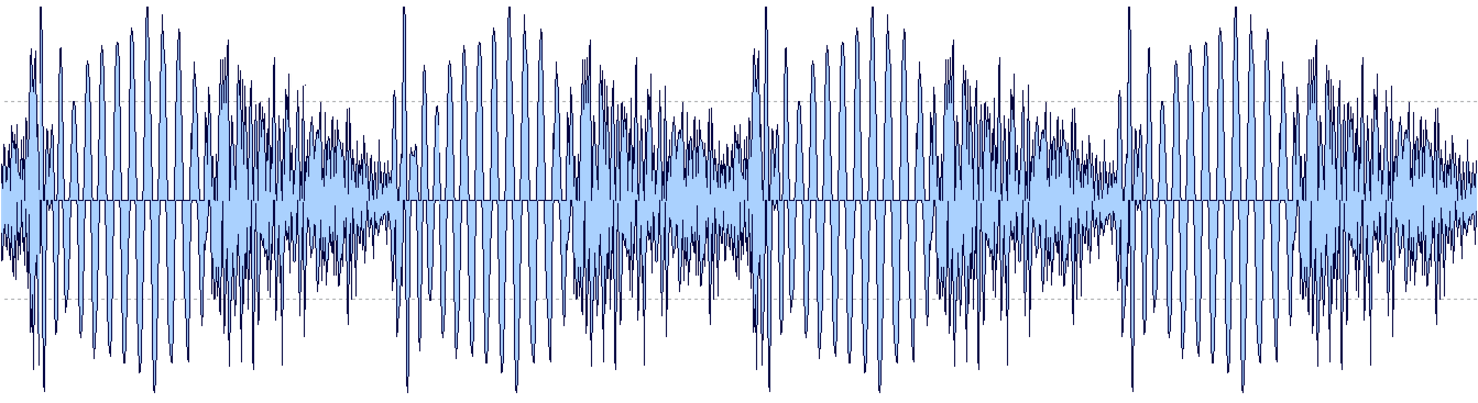 Music Produktion: Sidechain Effekt (Wave)